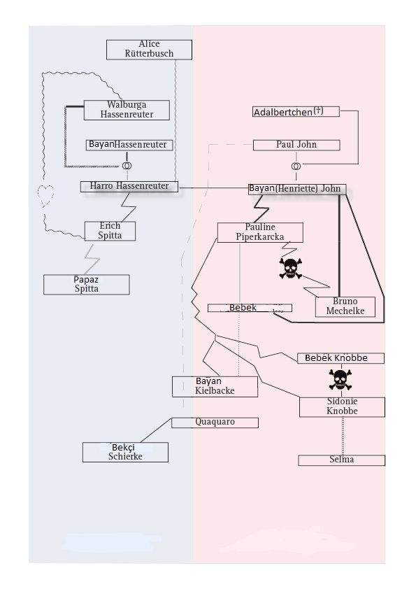 "Die Ratten - Figurenkonstellation"/"Fareler" - Figürler arası ilişkiler